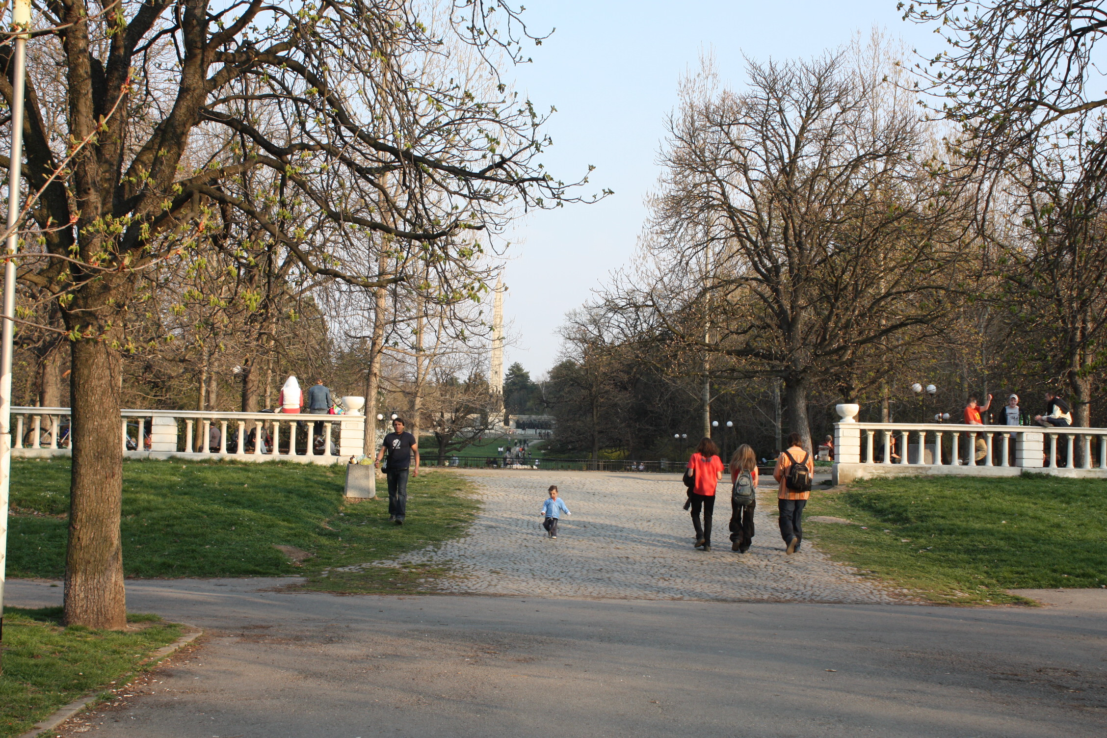 Borisova gradina, Борисова градина, Bulgaria